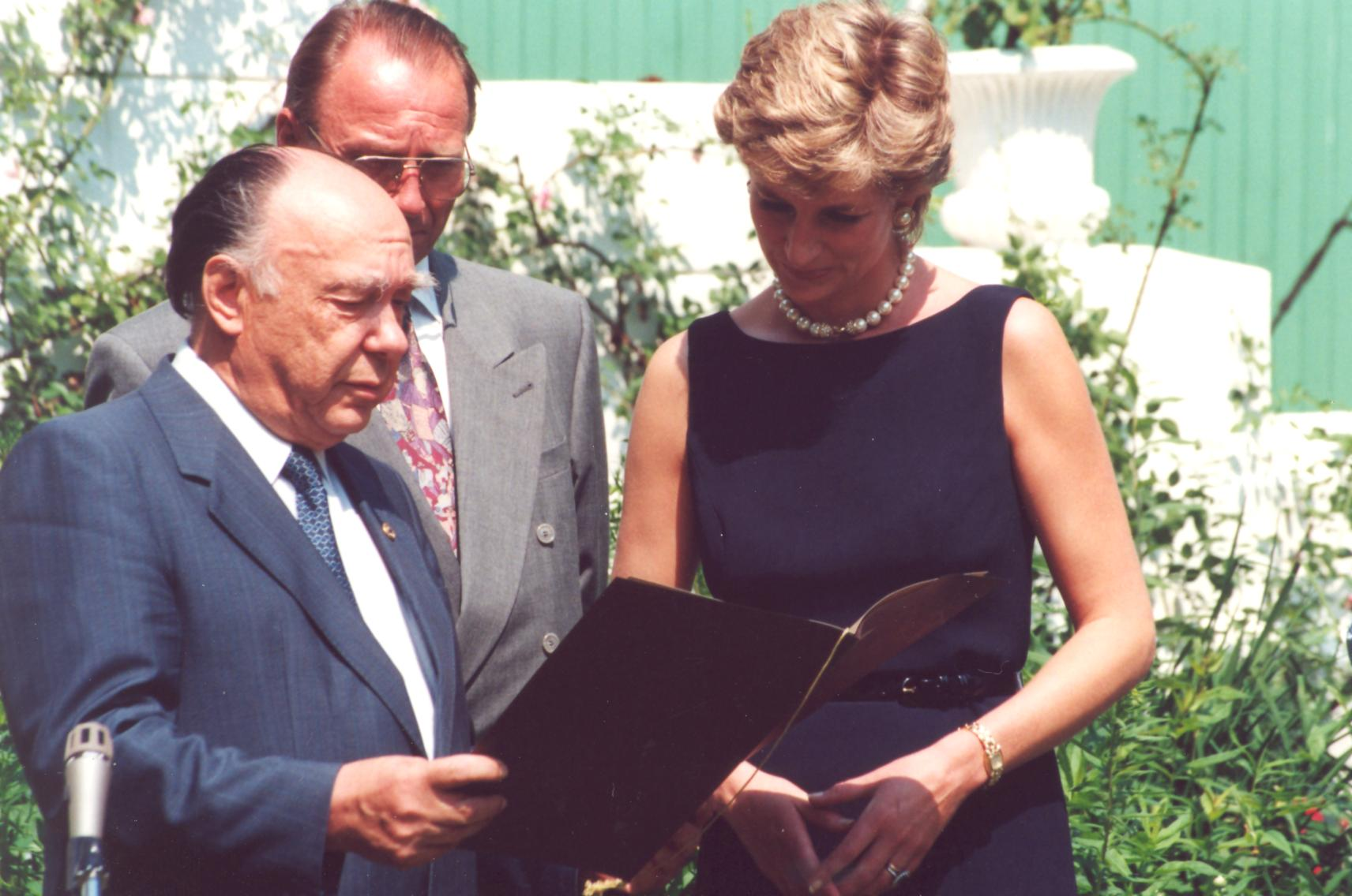 Международная Леонардо-премия